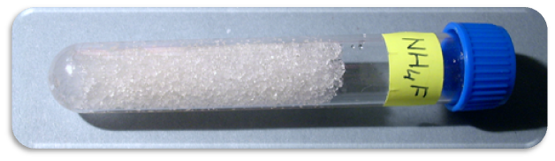 Fluorid amonný - NH4F